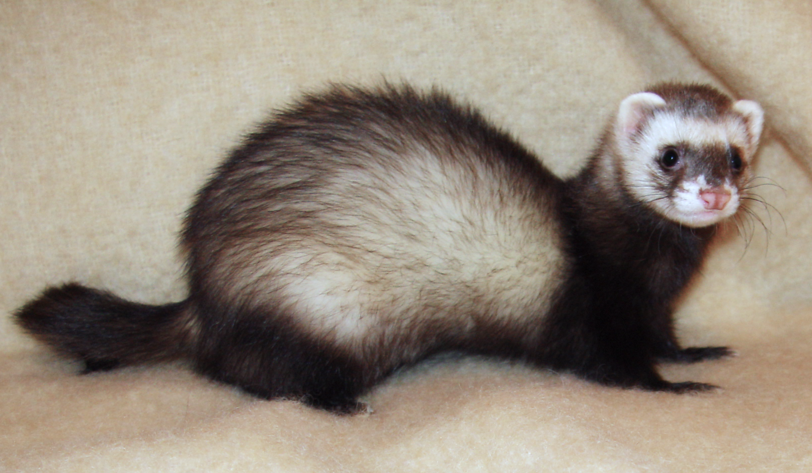 Roy